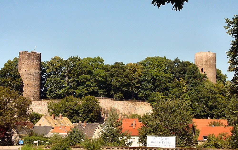 eigenes Foto von 2004, Public Domain Burg Kohren Mewes 06:54, 14. Apr 2005 (CEST)